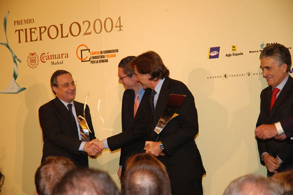 Entrega del IX Premio Tiepolo a Luca Cordero di Montezemolo y Florentino Pérez en la Embajada de Italia en Madrid el 18 de Enero de 2005.